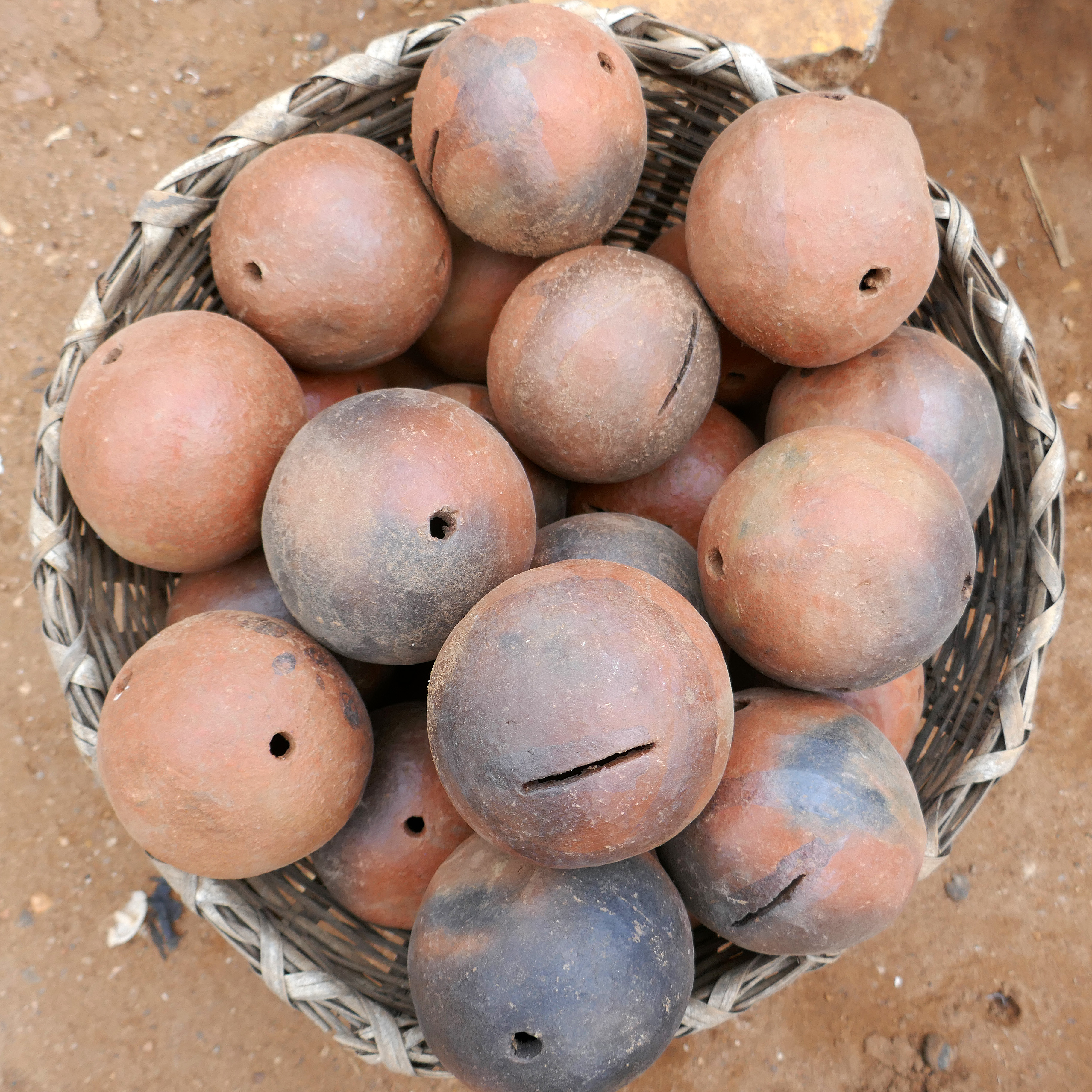 Vente de tirelires en poterie à Sè (commune de Houéyogbé, Mono, Bénin).